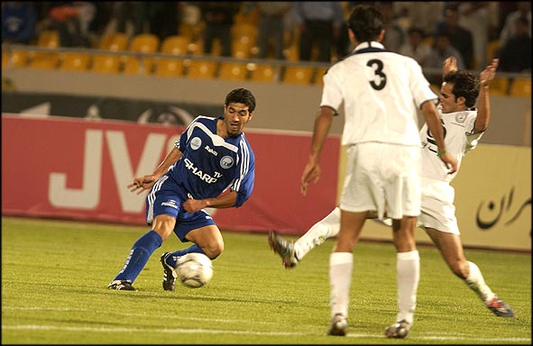 استقلال با دوگل سامره به پرسپولیس سلام كرد